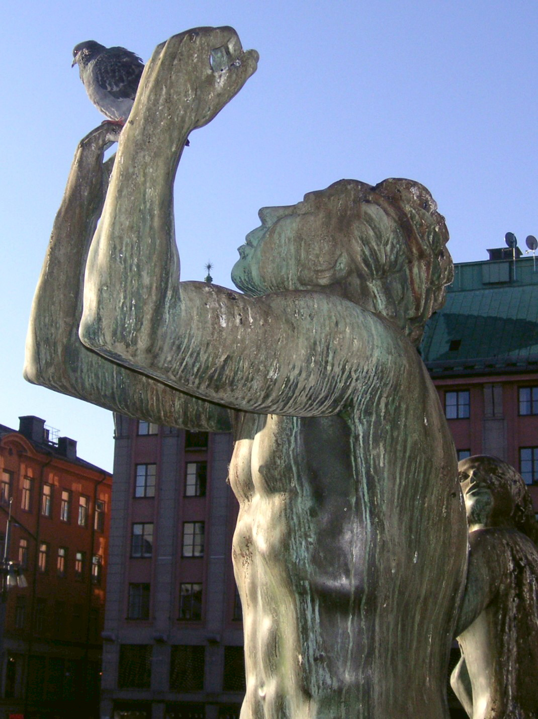 Carl Milles figur med Beethovens anledsdrag i figutgruppen "Orfeusbrunnen" i Stockholm